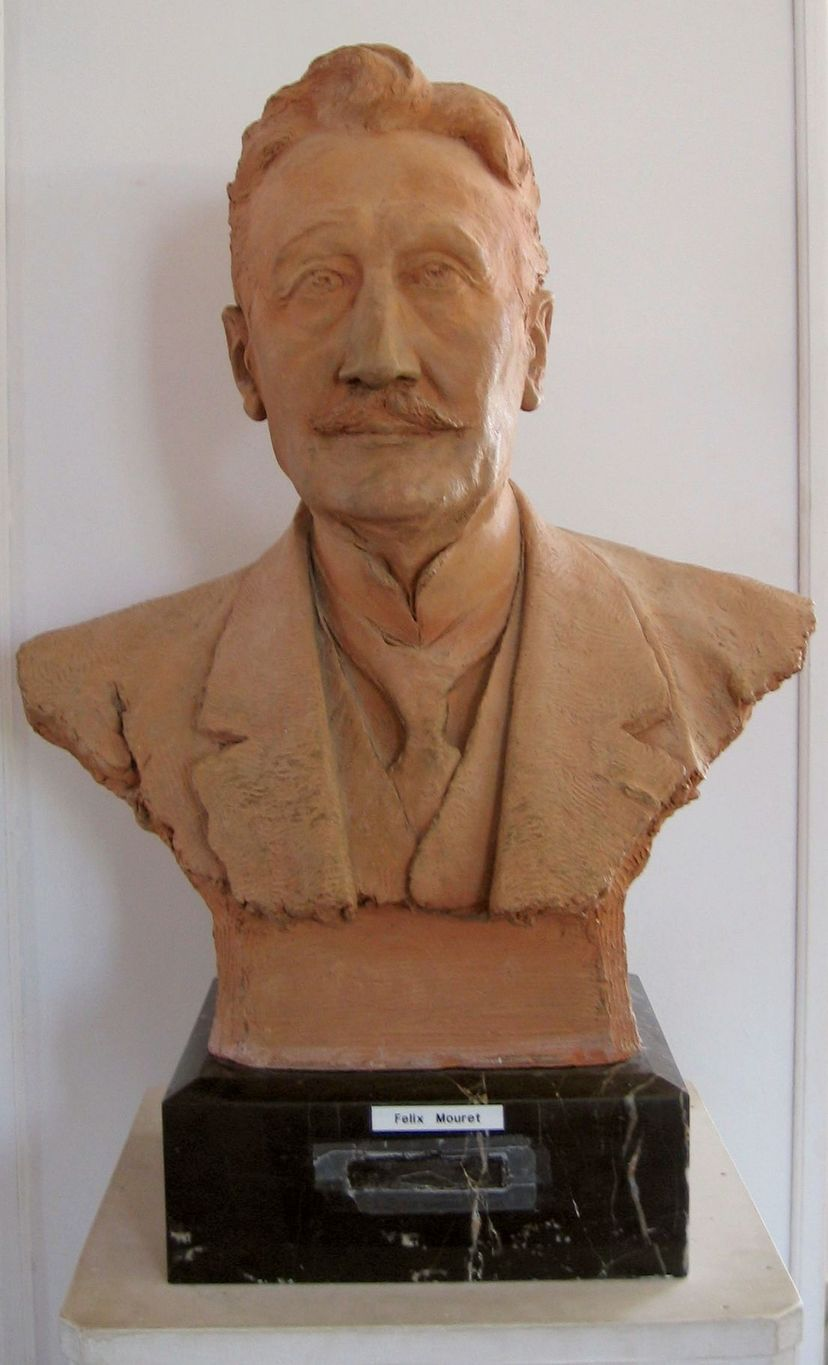 Buste en terre cuite de l'archéologue Félix Mouret, premier à fouiller le site d'Ensérune. Buste présenté au musée d'Ensérune.